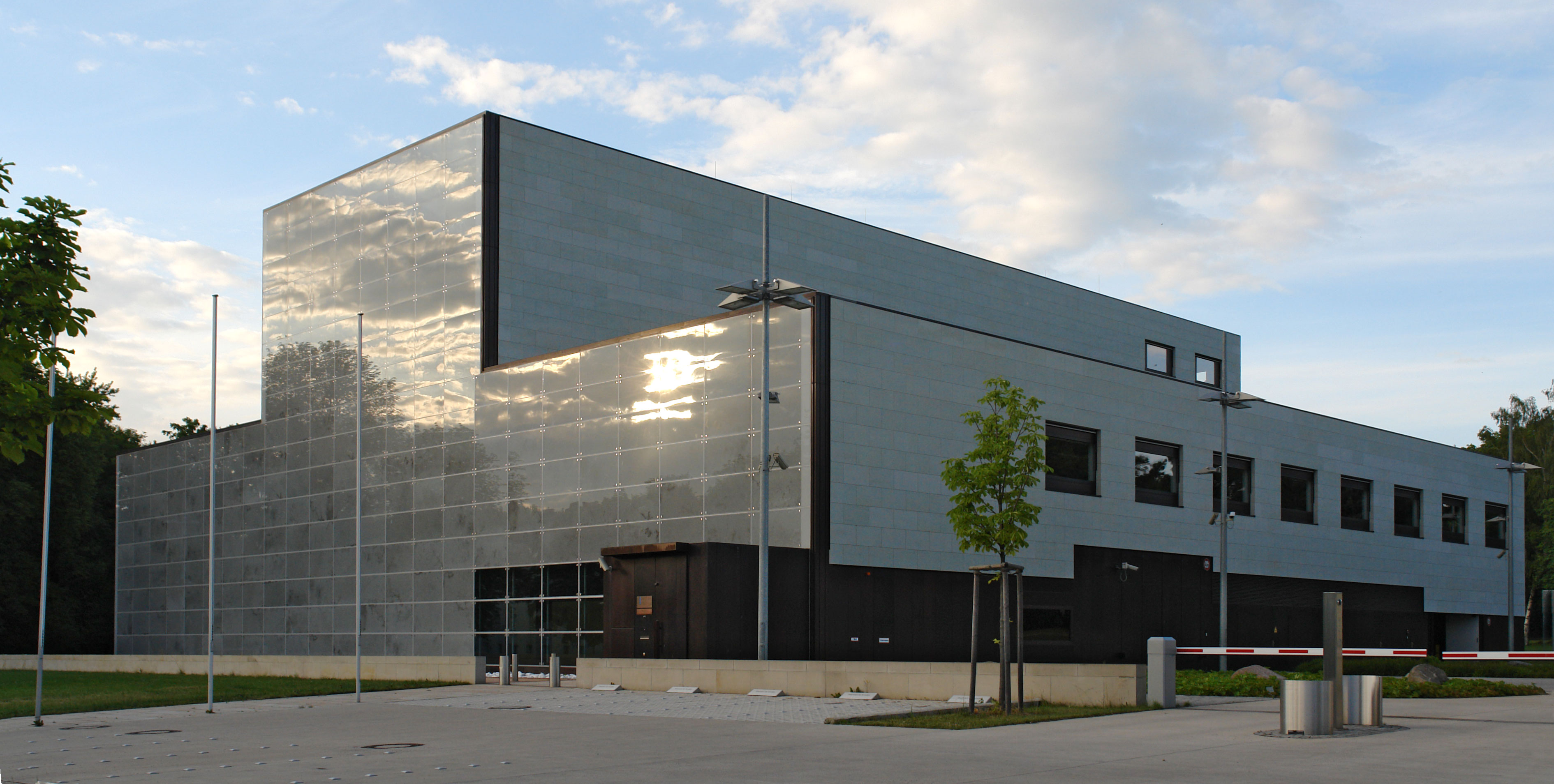 Bundesbank Filiale; Transluzente Alabaster-Fassade hinter Glas nach der Sanierung des durch Wassereinbruchs versuchten Bauschadens.